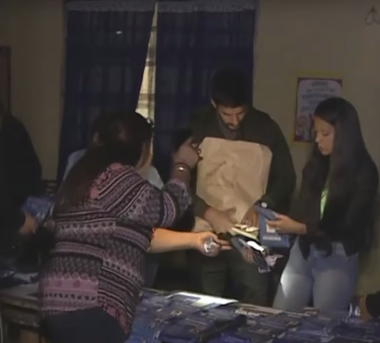 La provincia de Formosa votando sin luz, tras el apagón de 2019.